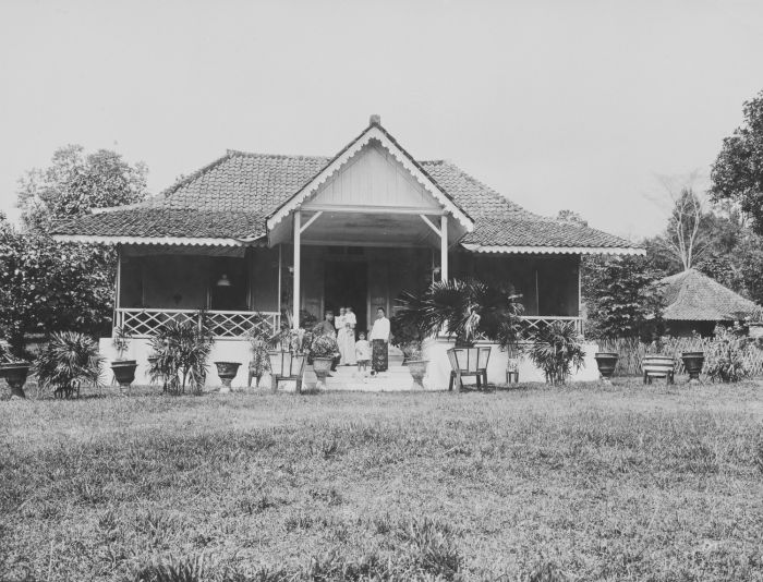 foto. Een opzichter van een onderneming in Sariredja met familie en baboe op de trappen van de opzichterswoning